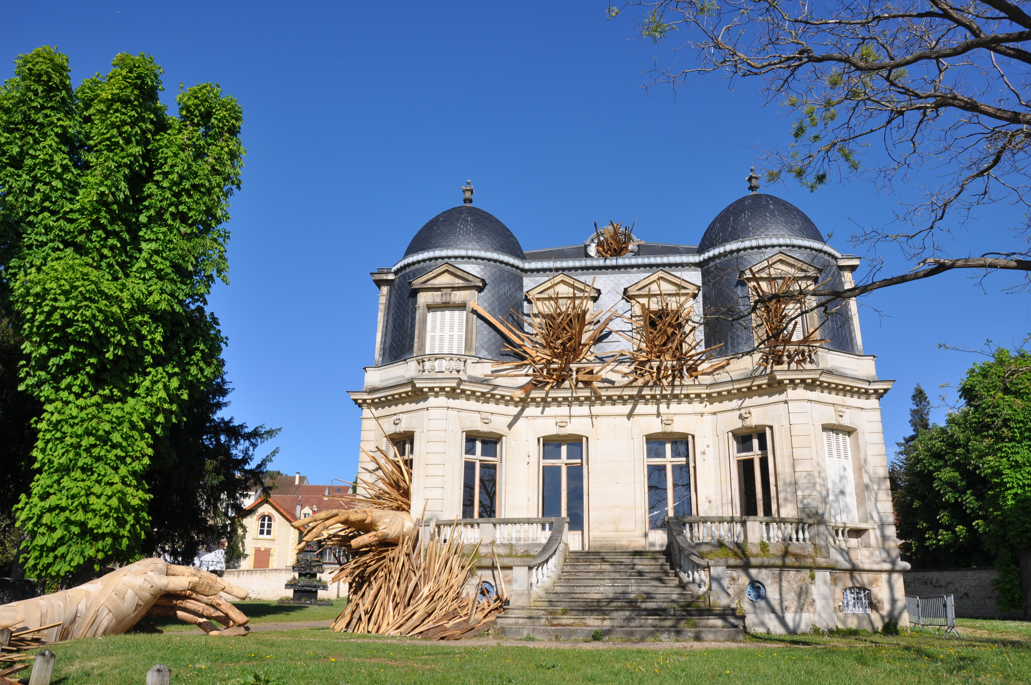 Oeuvre in situ créée par l'artiste Pedro Marzorati.